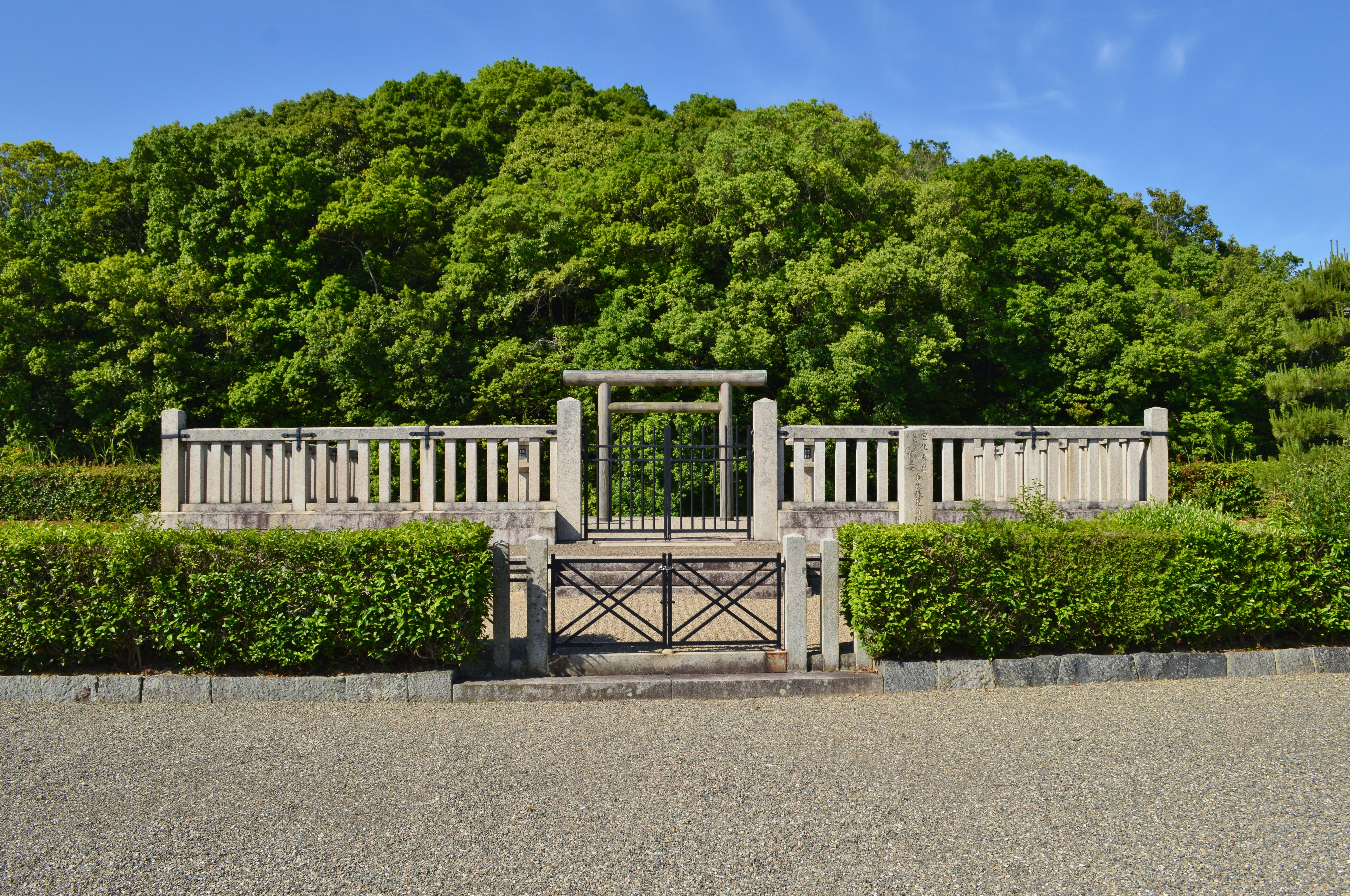 宣化天皇身狹桃花鳥坂上陵 拝所